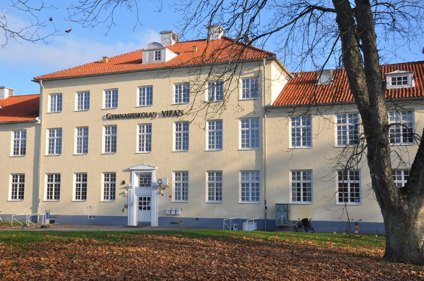 Fotograf: Tina Frennesson